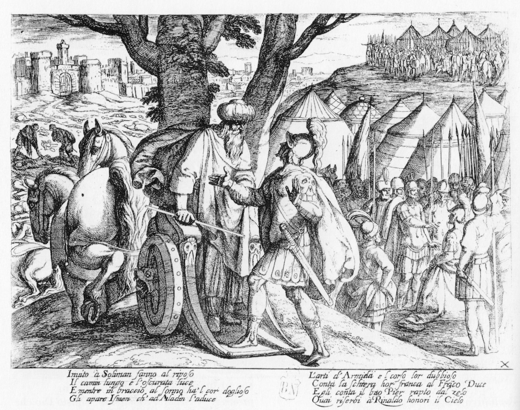 Antonio Tempesta, grabado para la Gerusalemme Liberata (Tasso)